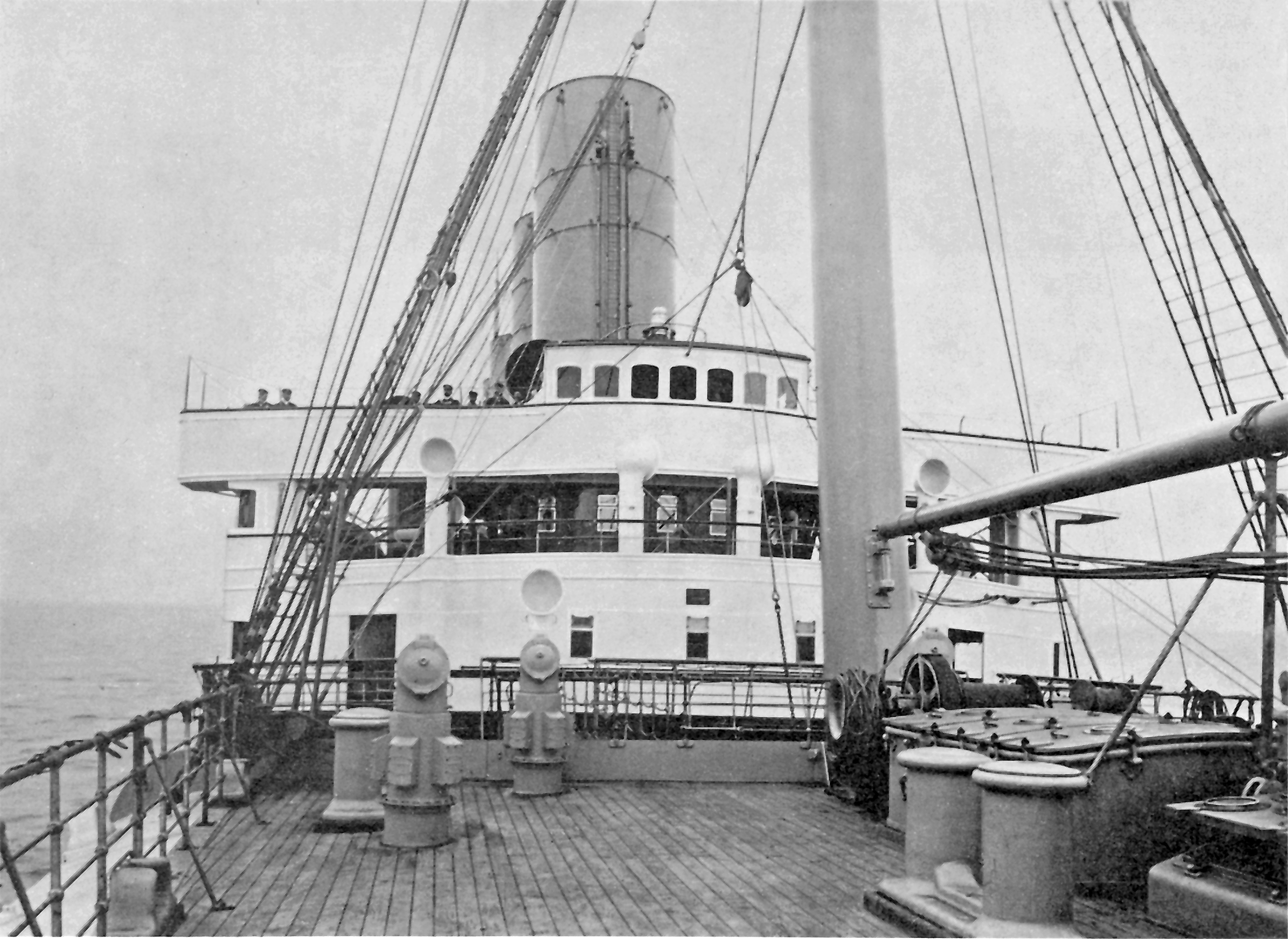 Der 1901 in Dienst gestellte Vierschonsteiner Kronprinz Wilhelm. Blick vom Vordeck mit dem dempfgetrieben Ladebaum in Richtung Brücke. Unter der Brücke befand sich die Kapitänskajüte und darunter das Lese-und Schreibzimmer.